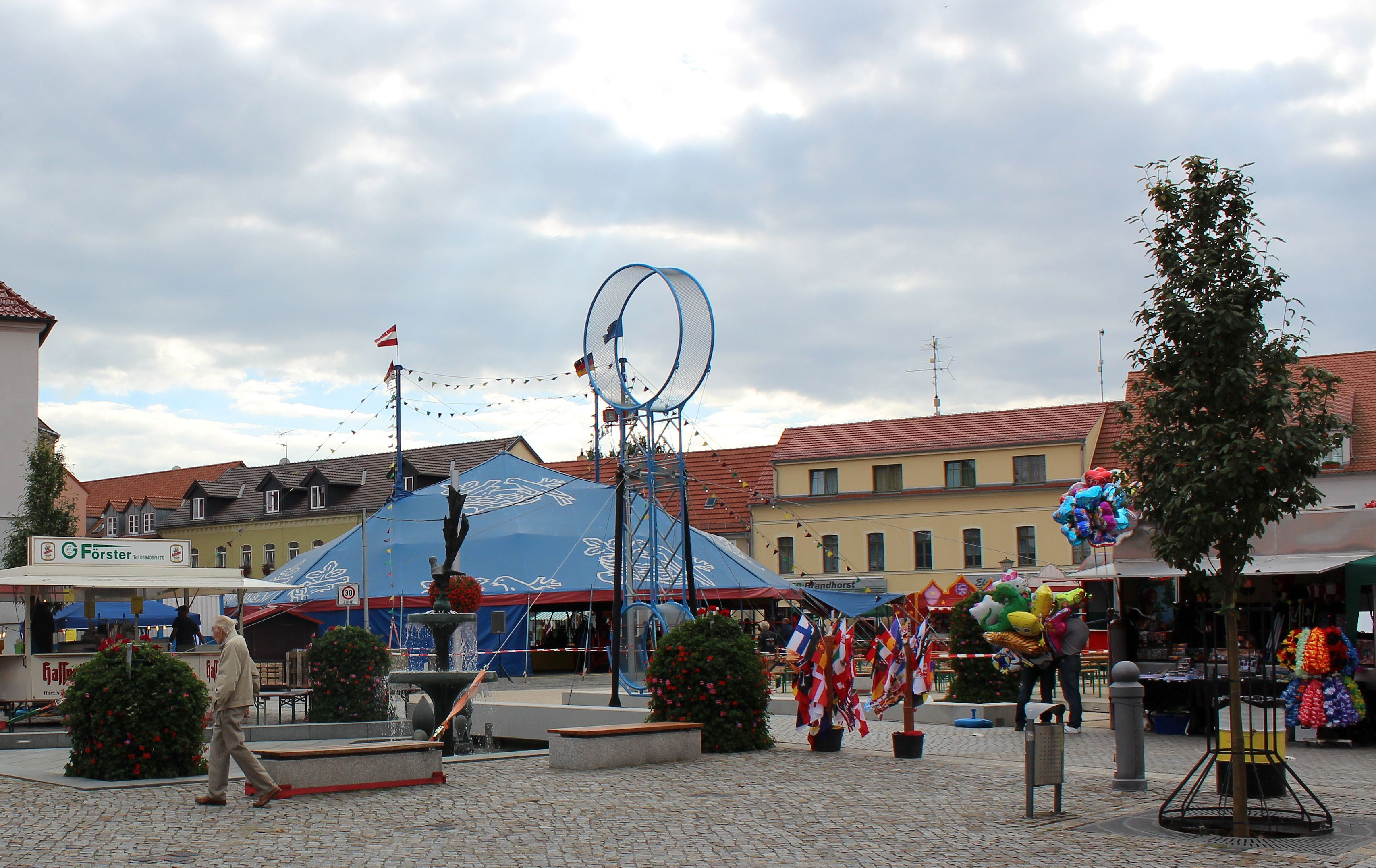 Der Markt in Elsterwerda zur Historischen Enkaufsnacht. Auf der Südspitze befindet sich das Zirkuszelt der Rolandos.